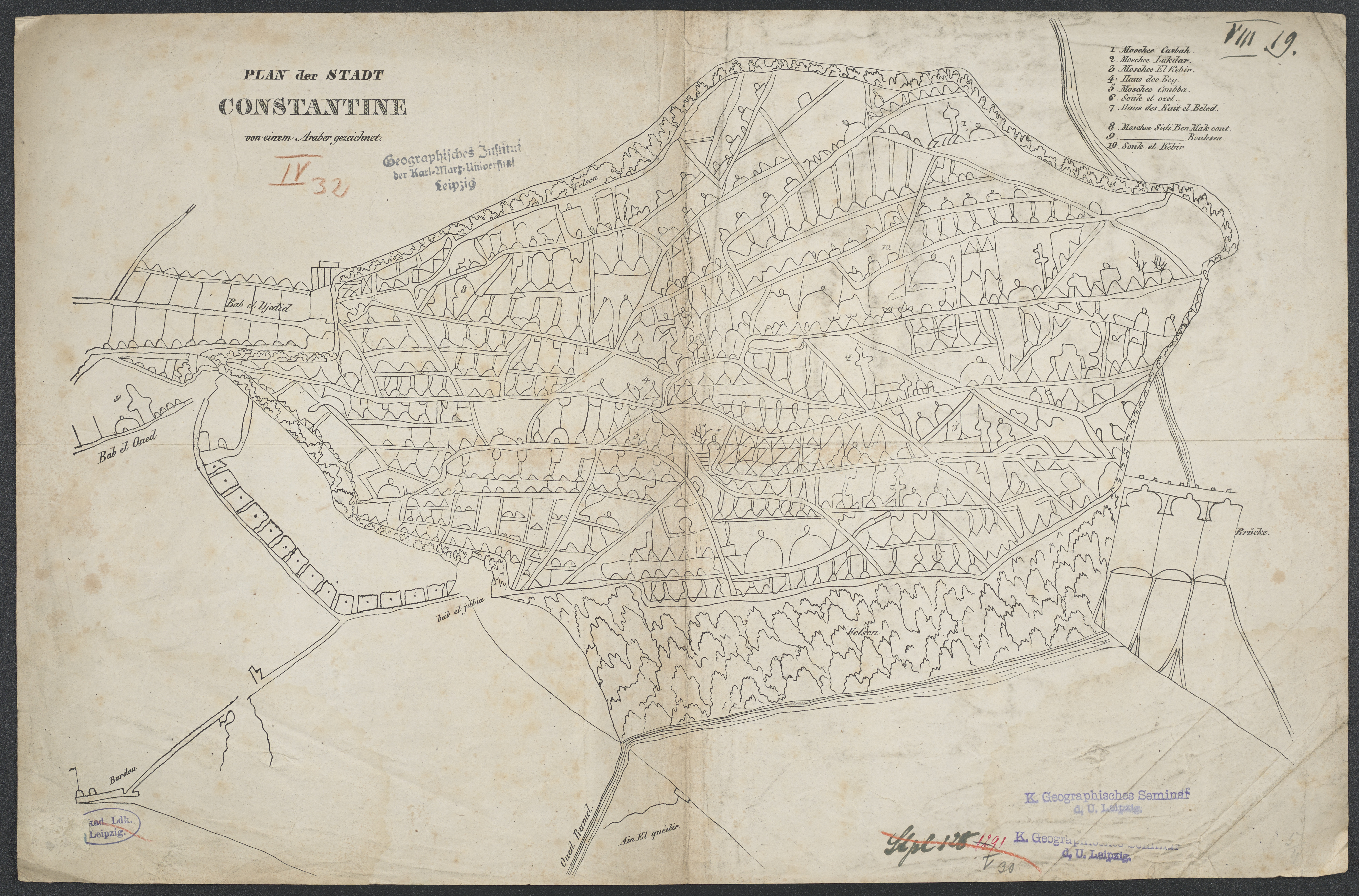 1 Kt. : unkolor. (Blattgr. 49 x 32 cm); Koordinaten E 6°36'31"-E 6°37'01"/N 36°22'22"-N 36°21'55" ; Ohne Maßstab. - Titel oben links. - Legende oben rechts. - Ohne Relief